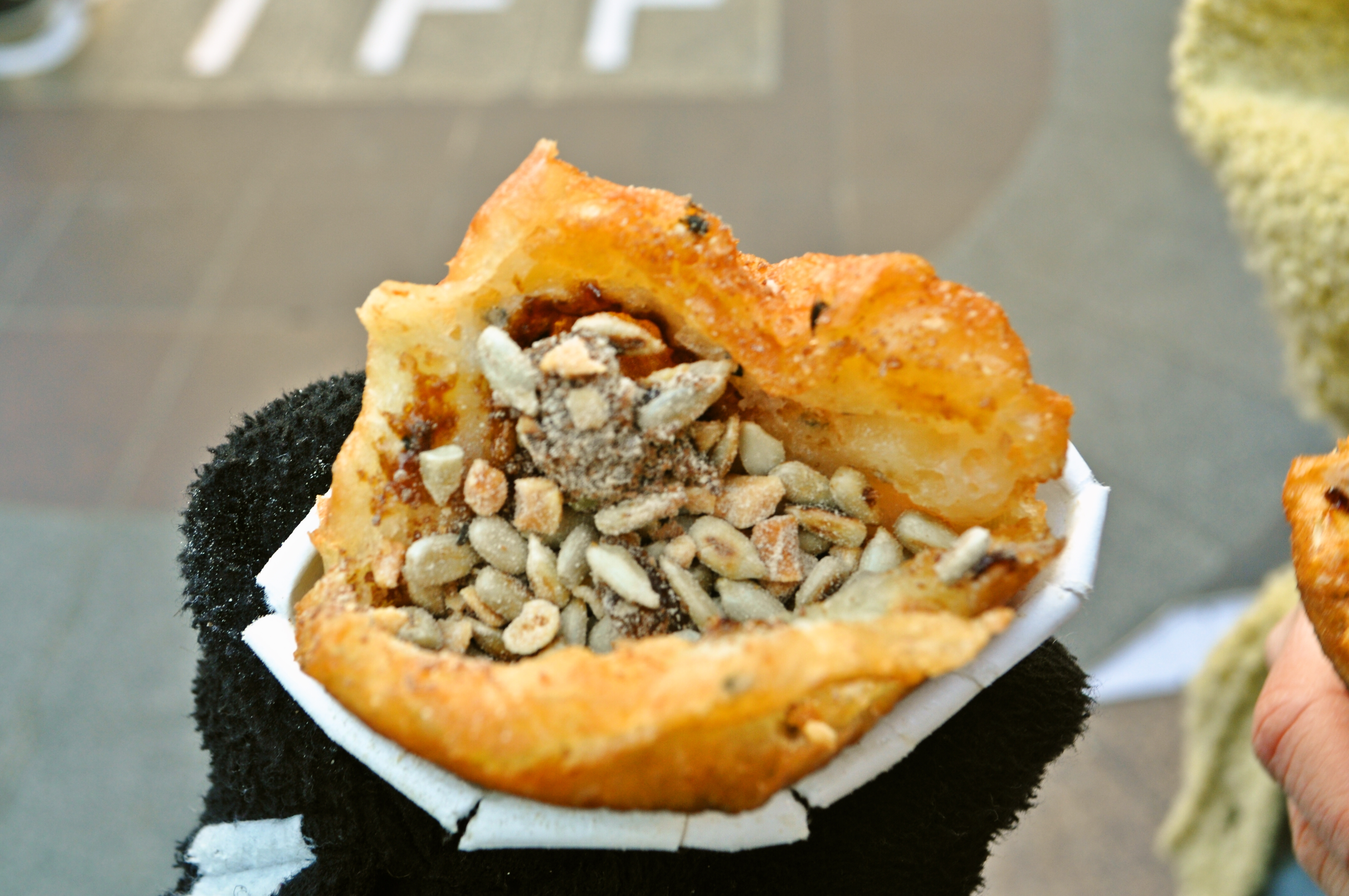 부산의 명물인 씨앗이 잔뜩 들어간 호떡